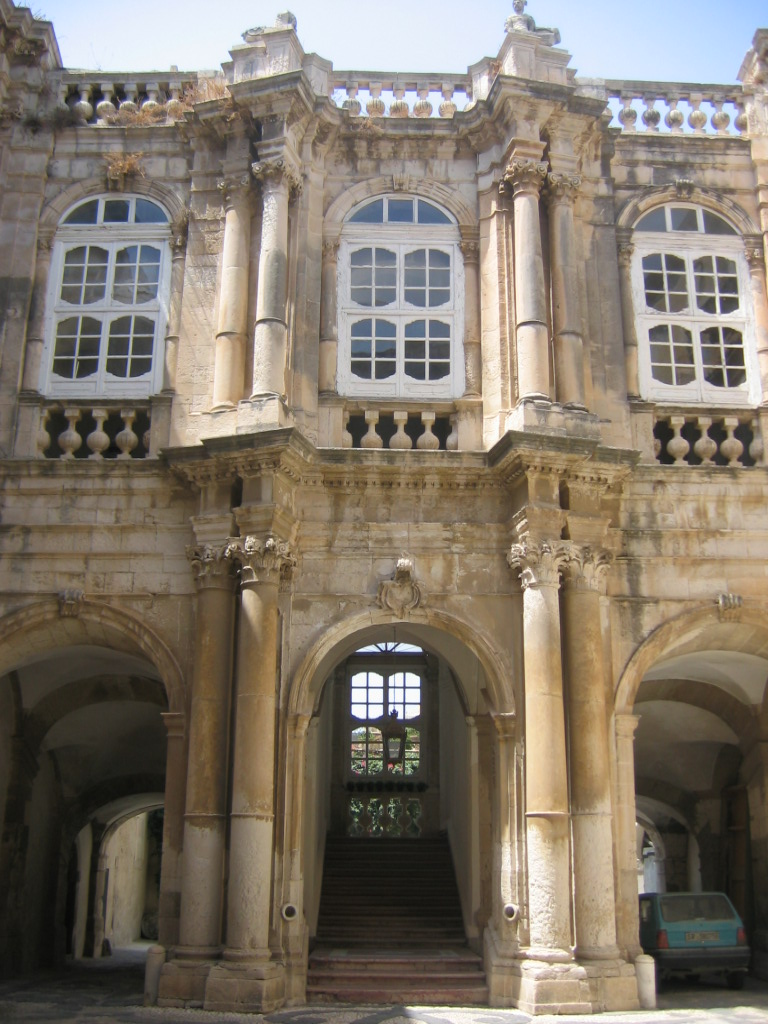 Cortile di Palazzo Beneventano del Bosco a Siracusa, in Piazza del Duomo.